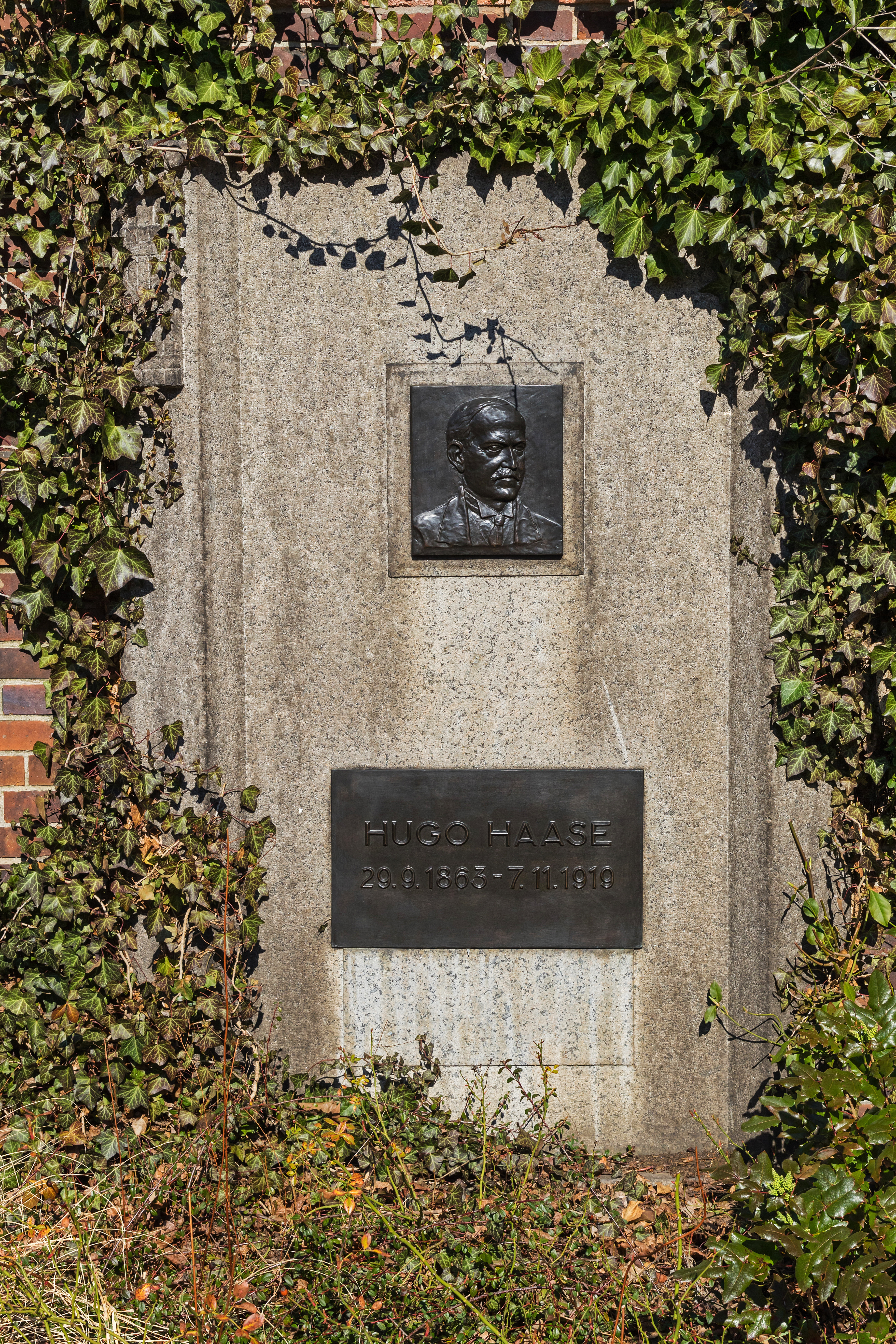 Zentralfriedhof Friedrichsfelde, Berlin-Lichtenberg. Gedenkstätte der Sozialisten, Grab von Hugo Haase.